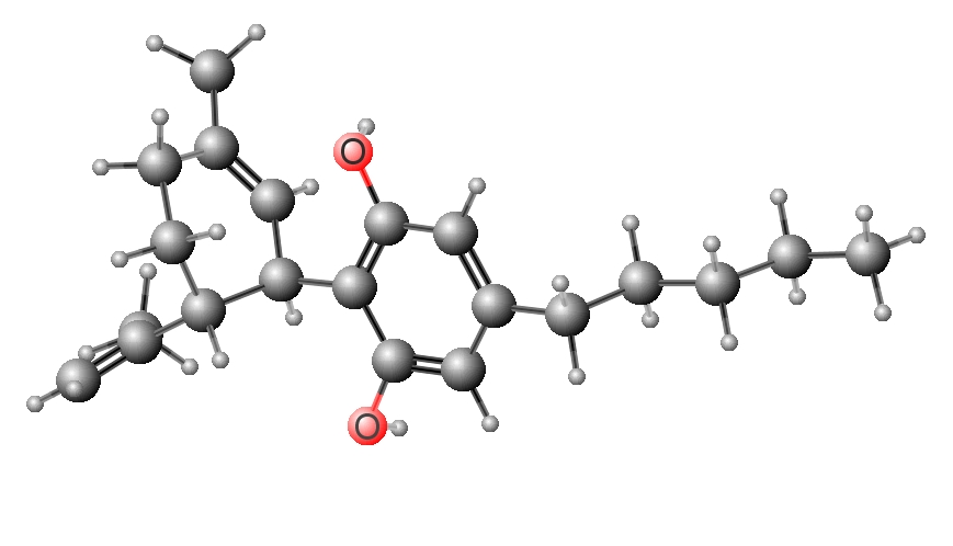 molécule de cannabidiol en 3D